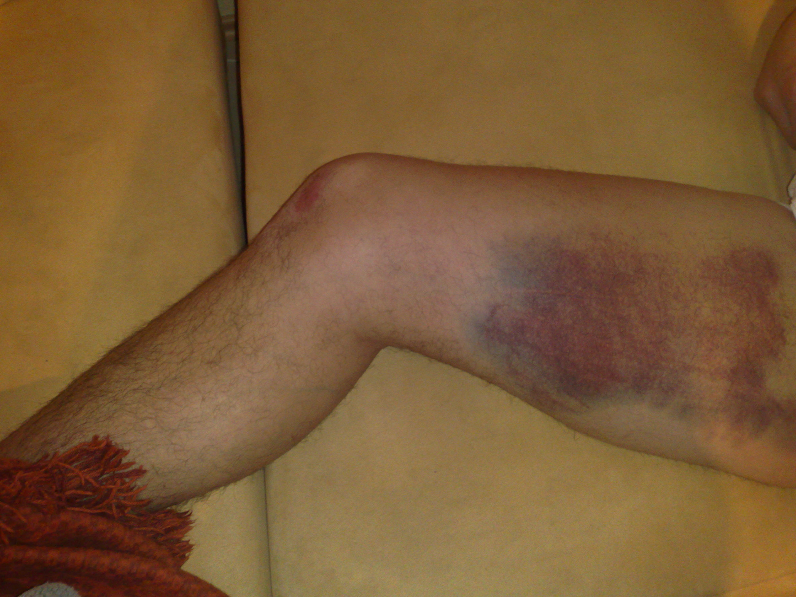 Zweifacher Muskelfaserriss am rechten Oberschenkel